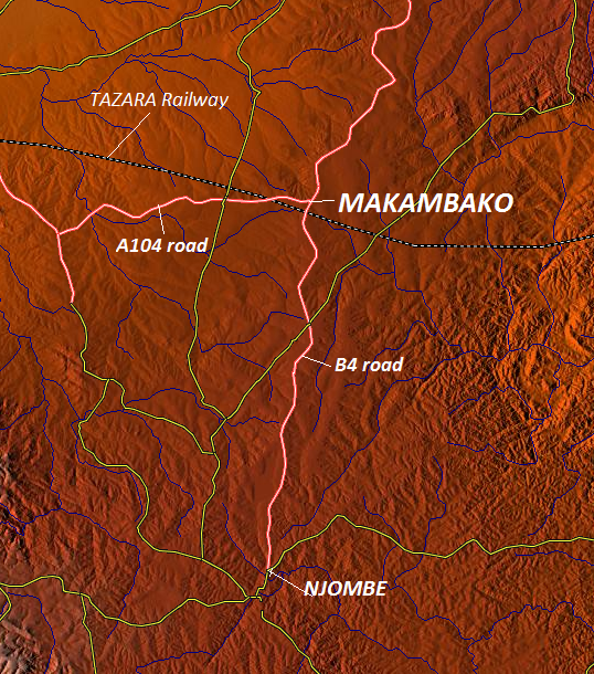 Map of Makambako, Njombe District, Tanzania